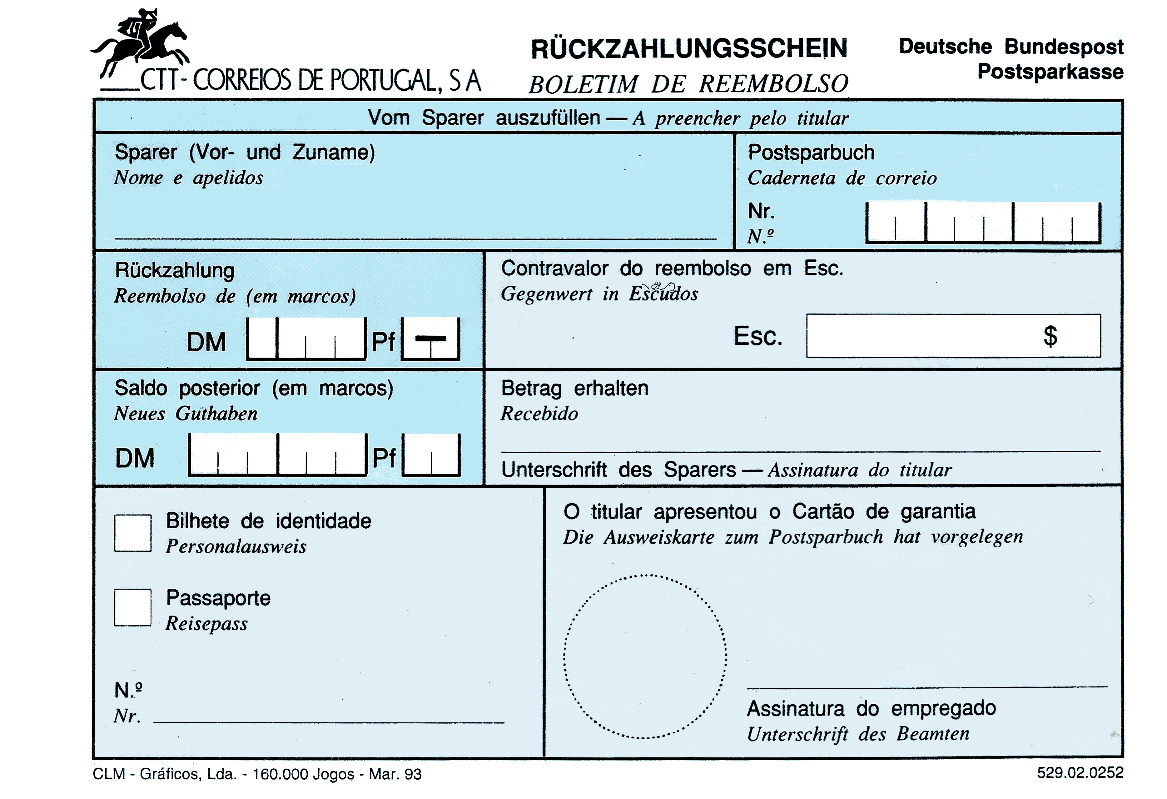 Rückzahlungsschein der Deutschen Bundespost, Postsparkasse, für Portugal.